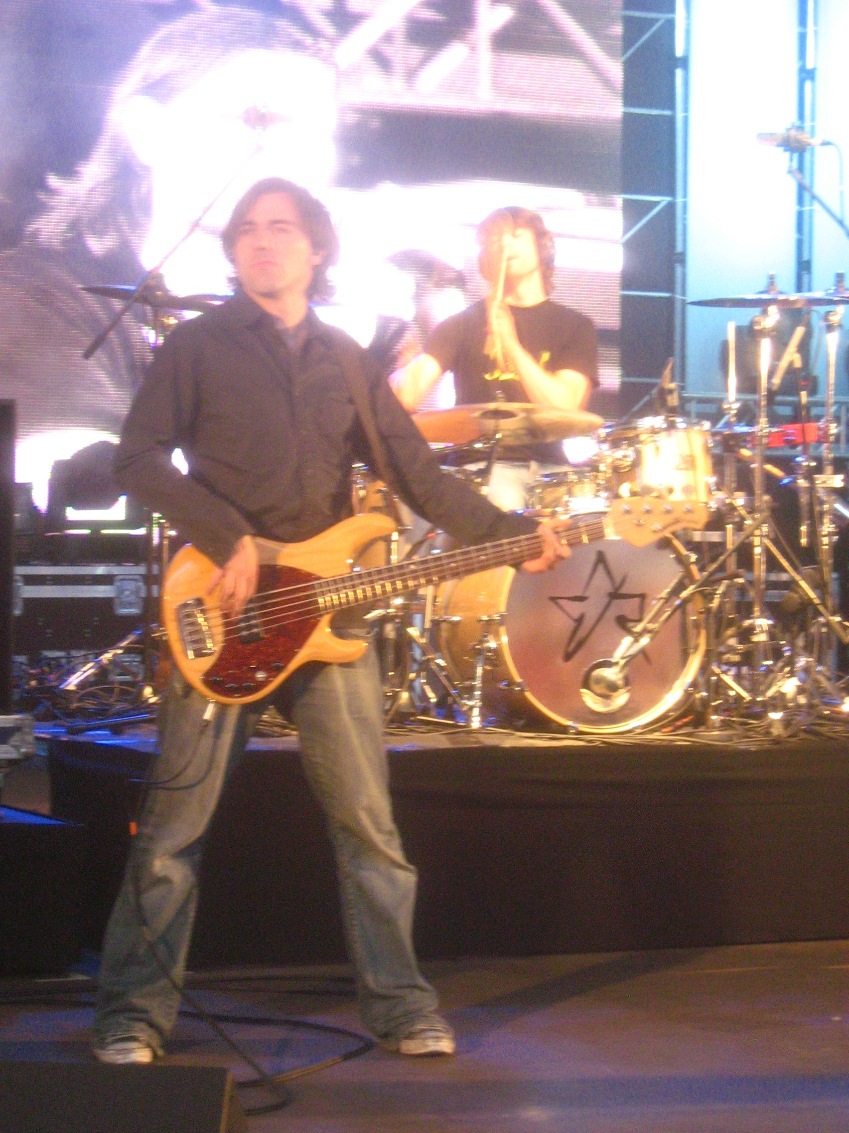 Philipp Rauenbusch z zespołu Reamonn podczas koncertu w Teatrze Letnim w szczecinie. 5 lipca 2008.